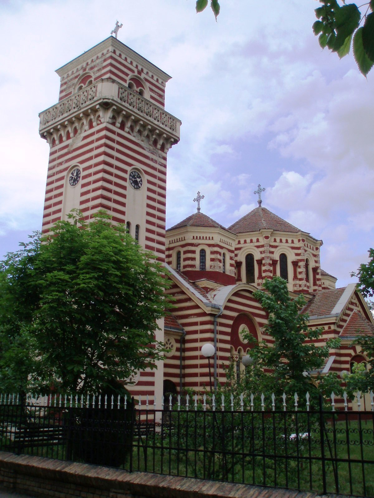 Srpski (latinica): Crkva u Orlovatu, arh. Dragiša Brašovan, sagrađena 1925. god., autor fotografije: Nicolo